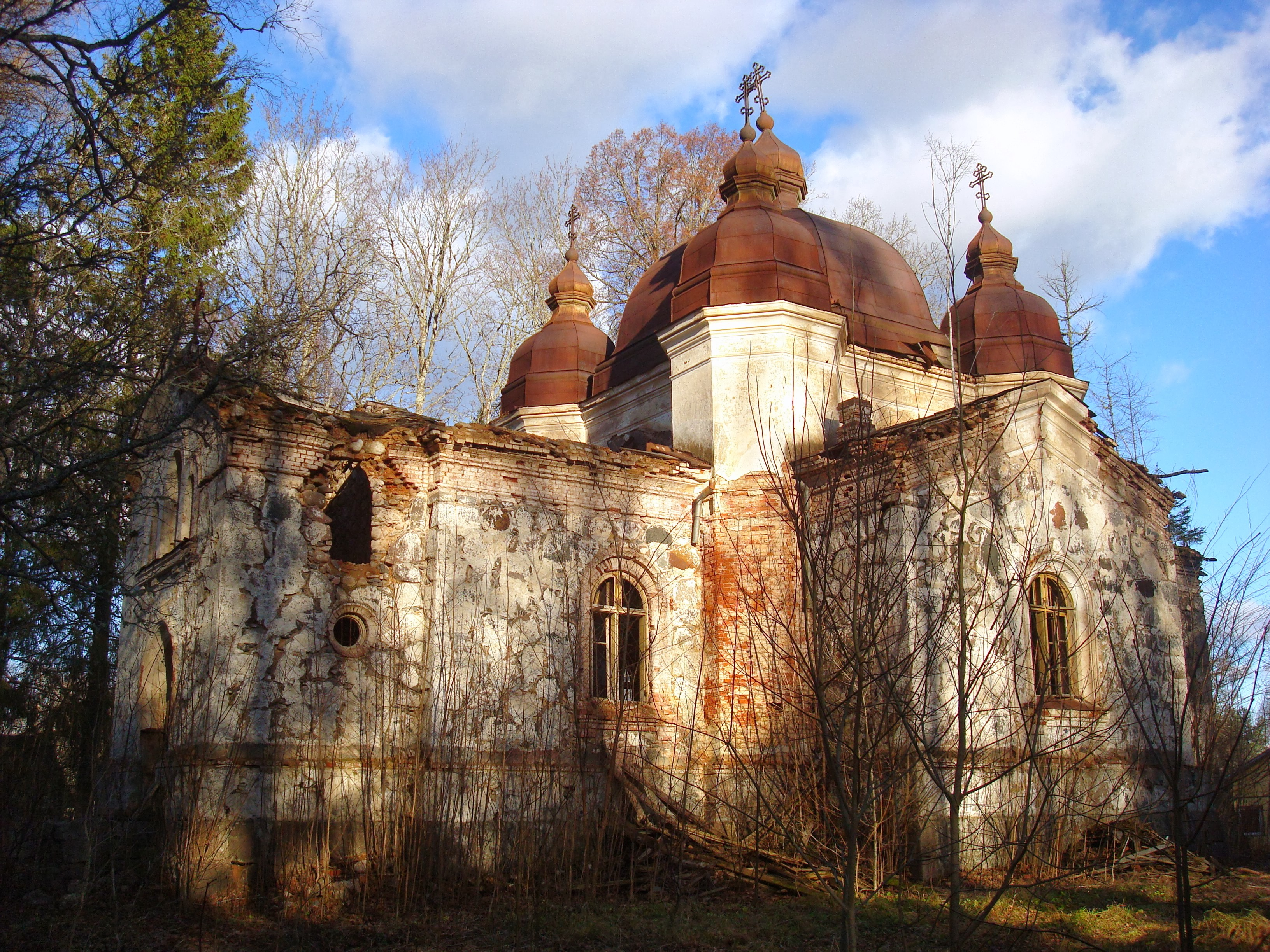 Penuja õigeuse kirik